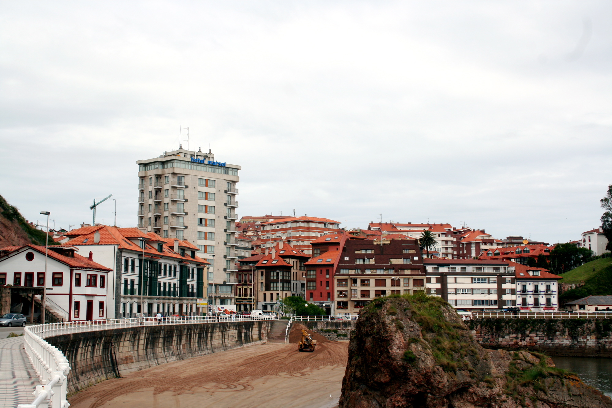 Pueblo marinero de Candás en Asturias, España